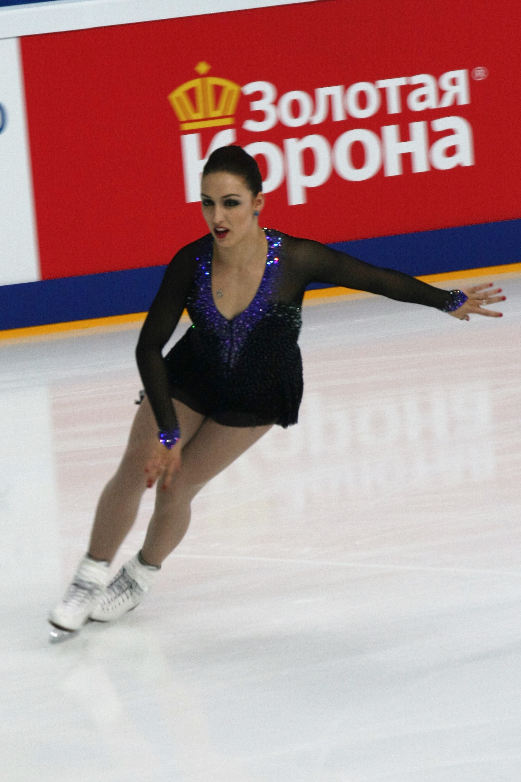 Кортни Хикс (США) на Кубке Ростелекома 2016